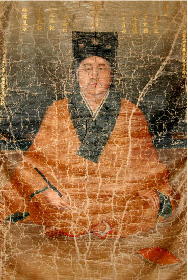 Chân dung Tể tướng Nguyễn Quán Nho.